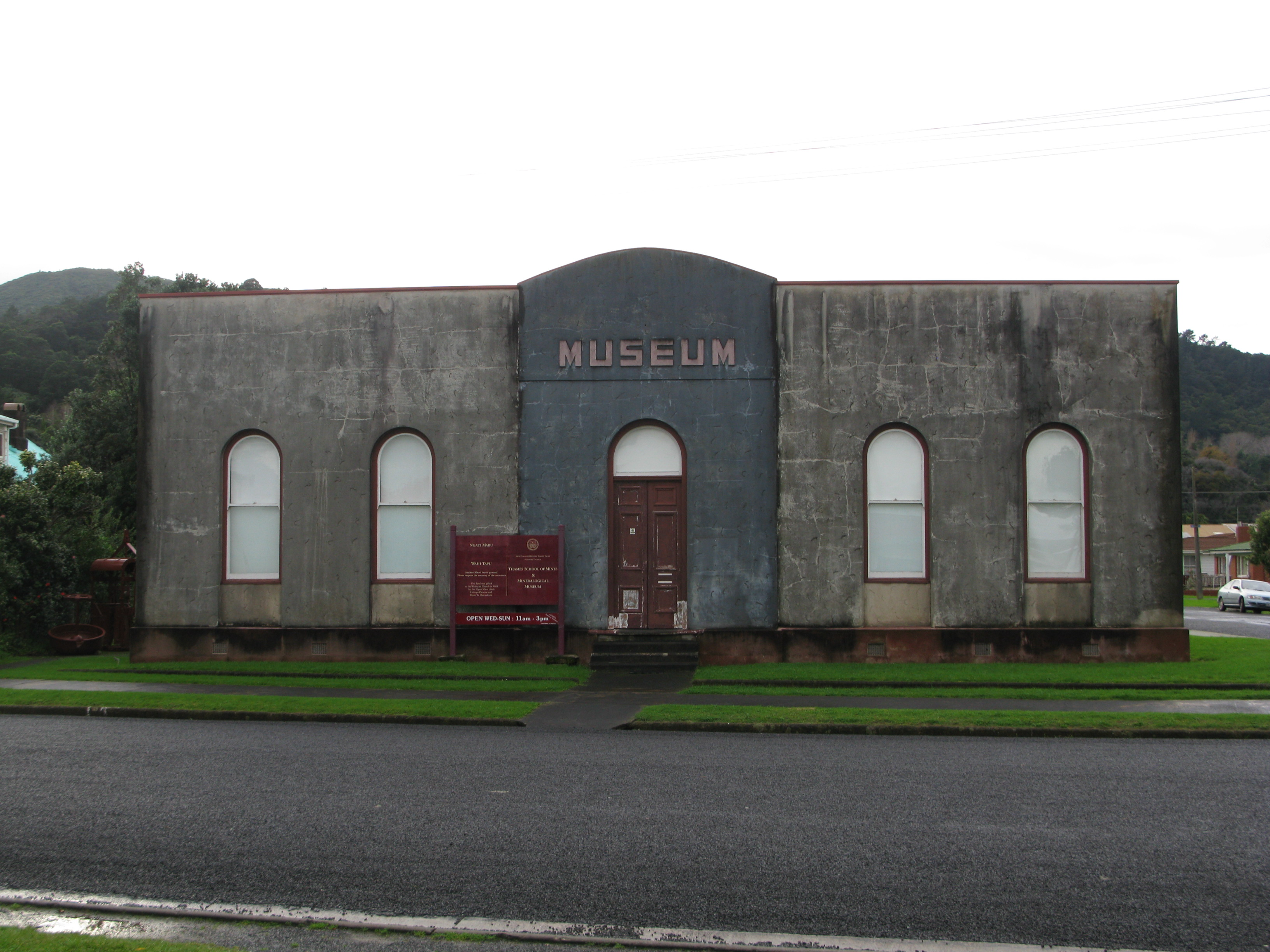 Musée minéralogique de Thames.